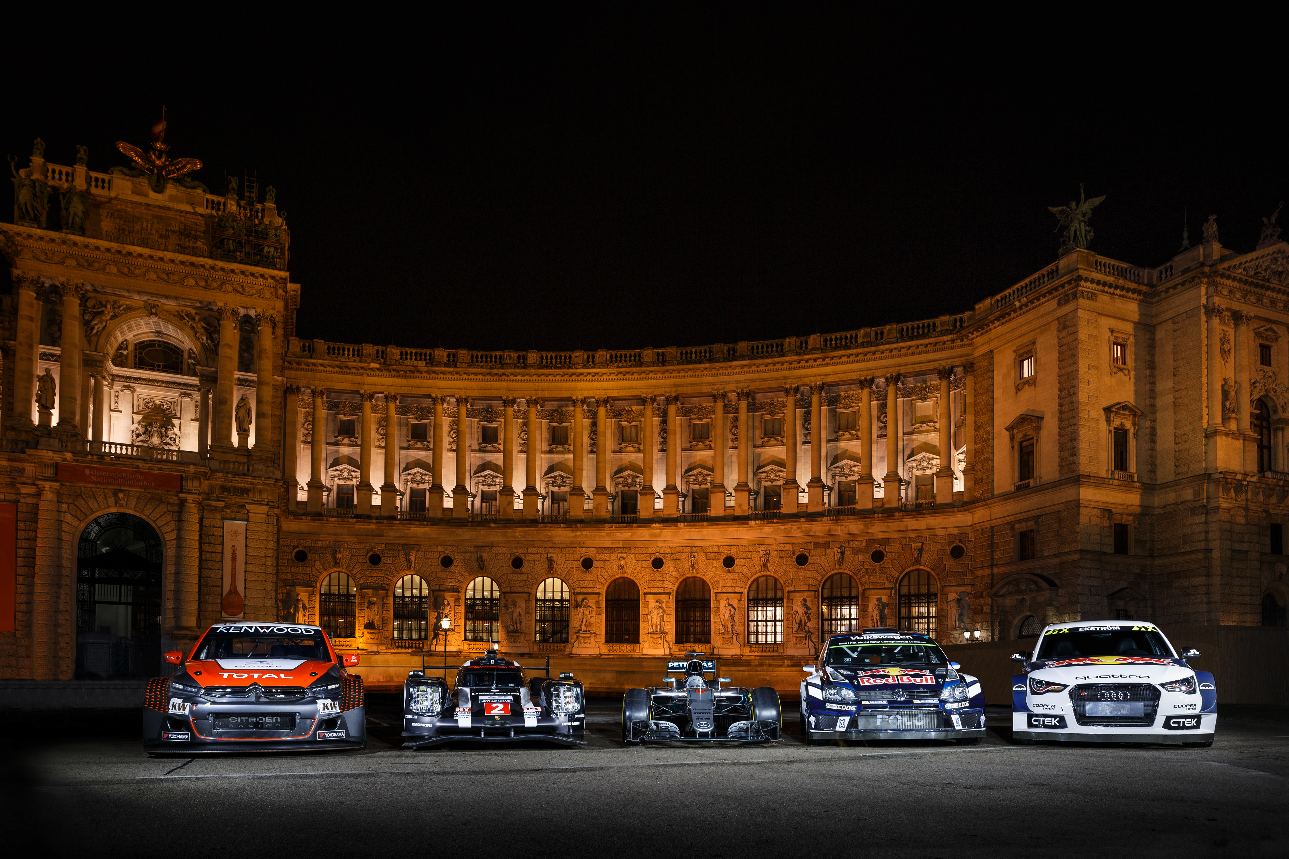 FIA Prize Giving, Vienna, 2nd december 2016